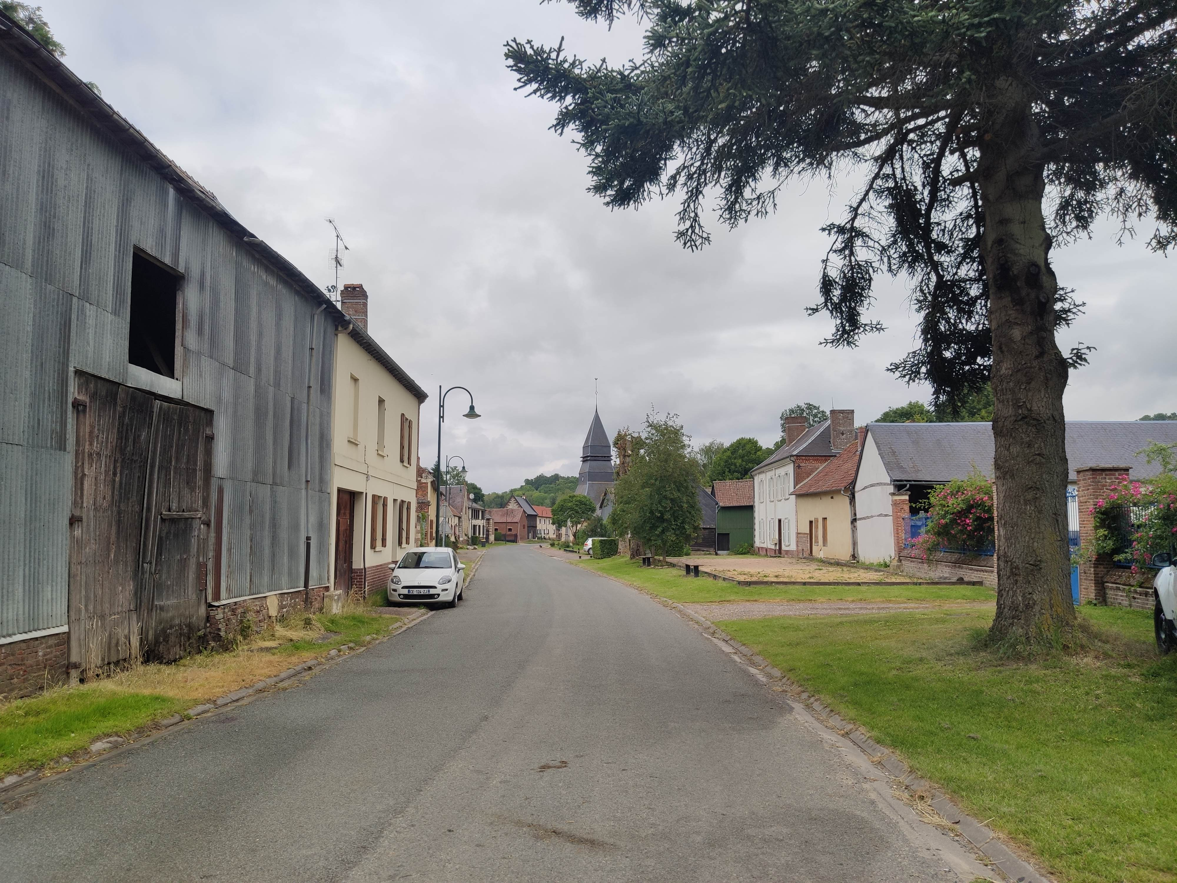 Thoix - Rue d'En Haut et clocher de l'église